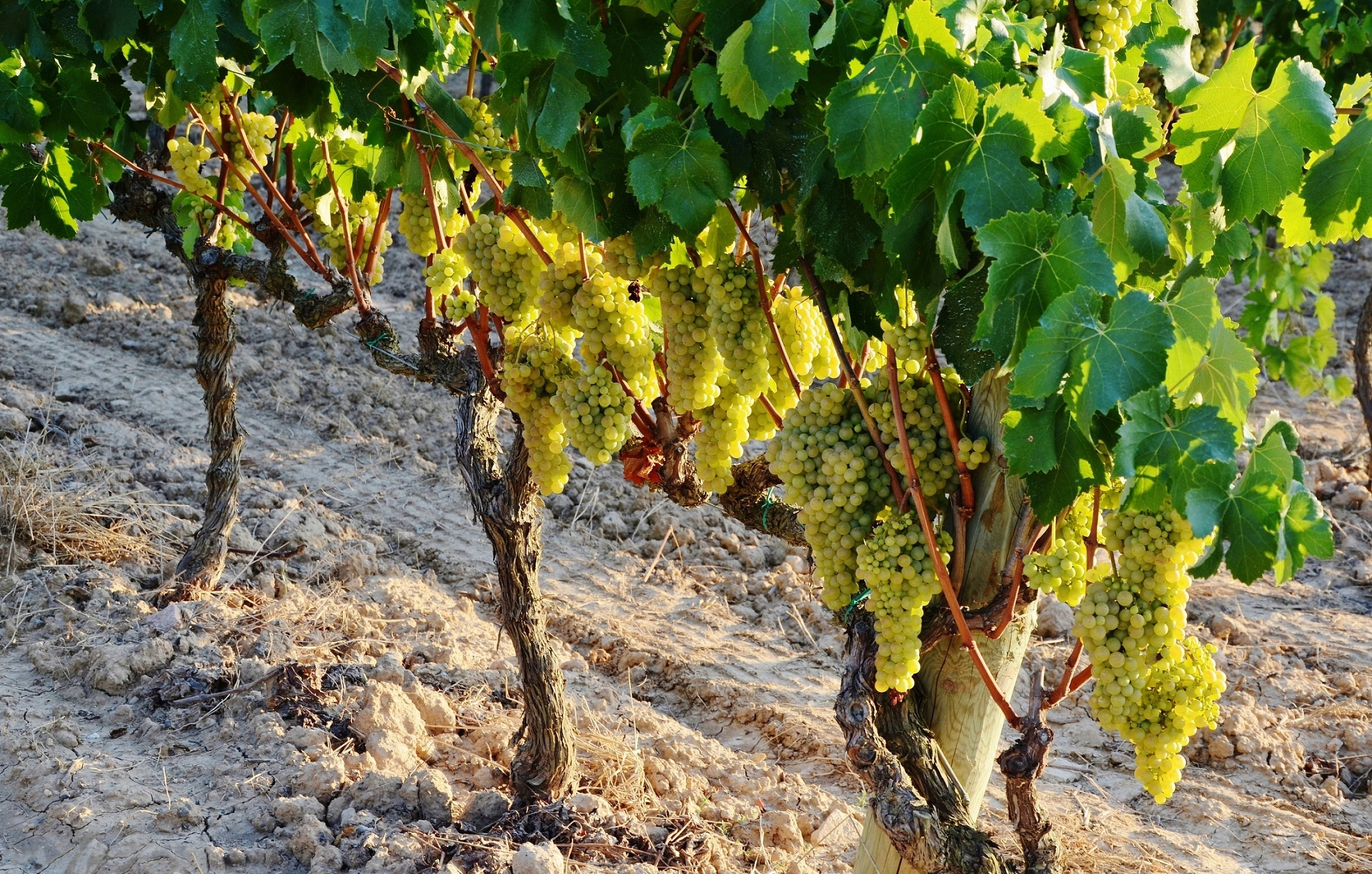 Raïm de macabeu a Lavern, Subirats